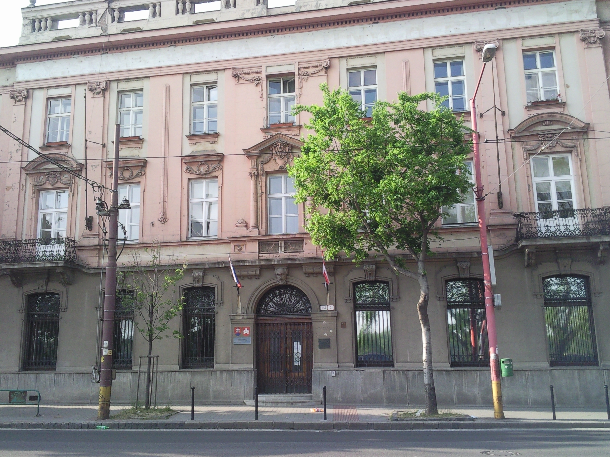 Vajanského nábrežie, Bratislava. Budovu, v ktorej dnes sídlia úrady mestskej časti Bratislava-Staré Mesto si dal v roku 1860 postaviť významný prešporský mešťan a veľkoobchodník (o.i. vlastnil medené hámre v Borinke) Anton Jurenák (1772 - 1837). V dome mal aj obchodnú kanceláriu agentúry Dunajskej paroplavebnej spoločnosti